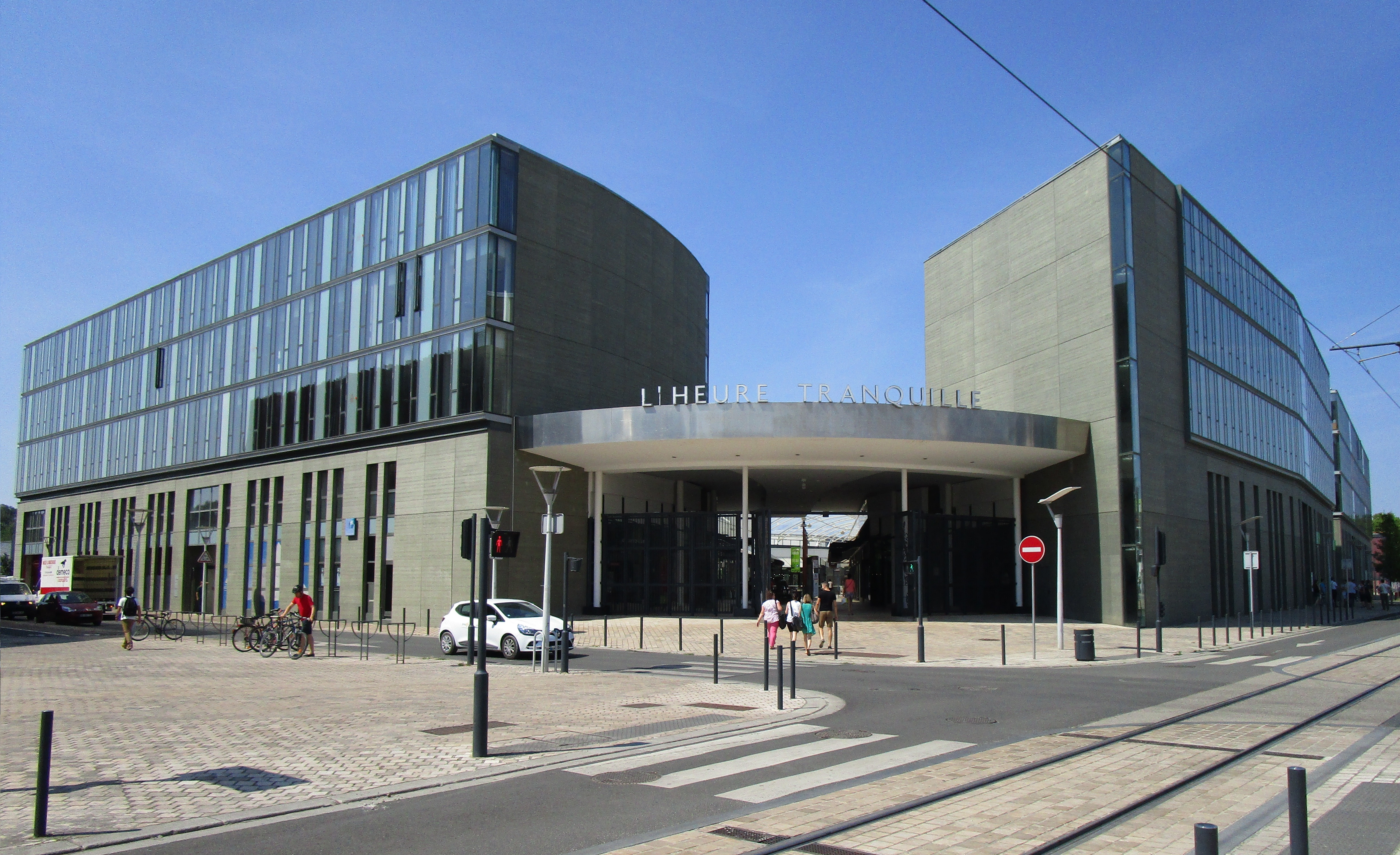 Le centre commercial de l'Heure tranquille, dans le quartier des Deux-Lions, à Tours.